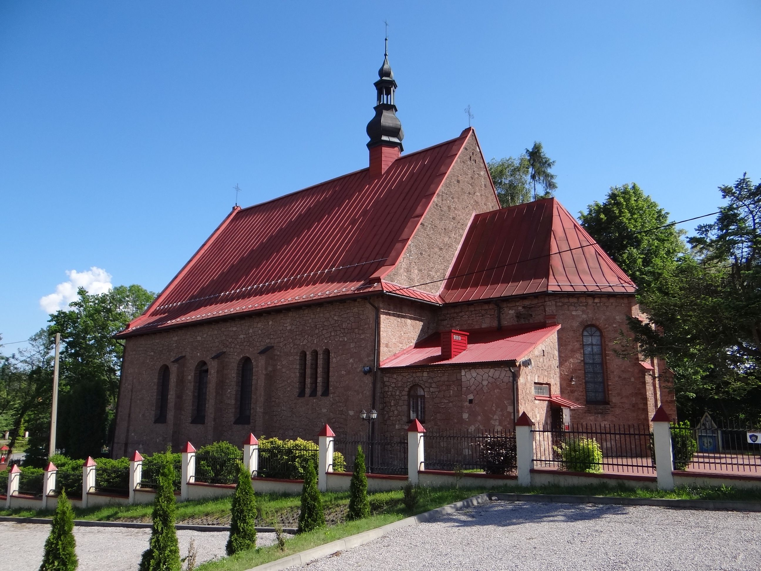 Kościół w Filipowicach